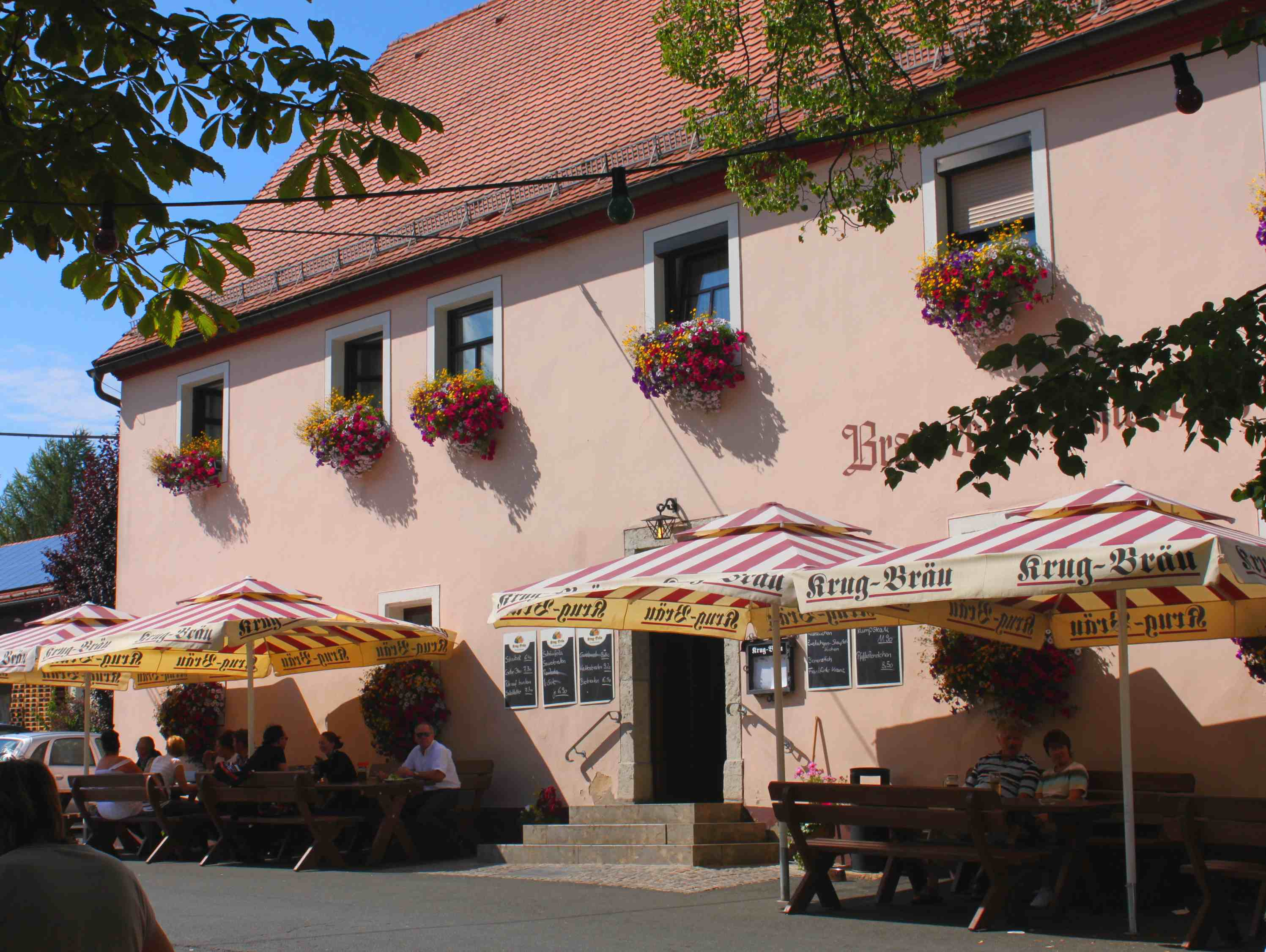 Der Gasthof der Brauerei Krug in Breitenlesau ist ein Ausflugsziel für Gäste aus einem weiten Umkreis